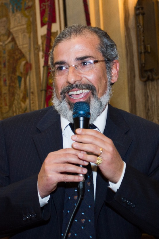 Enzo Rapisarda